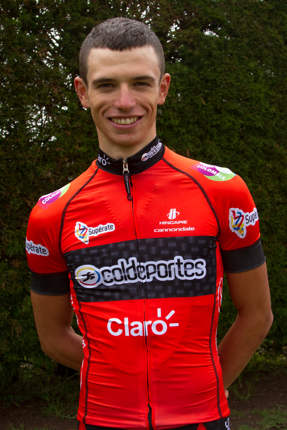 Daniel Jaramillo con el maillot del Coldeportes Claro en 2013.